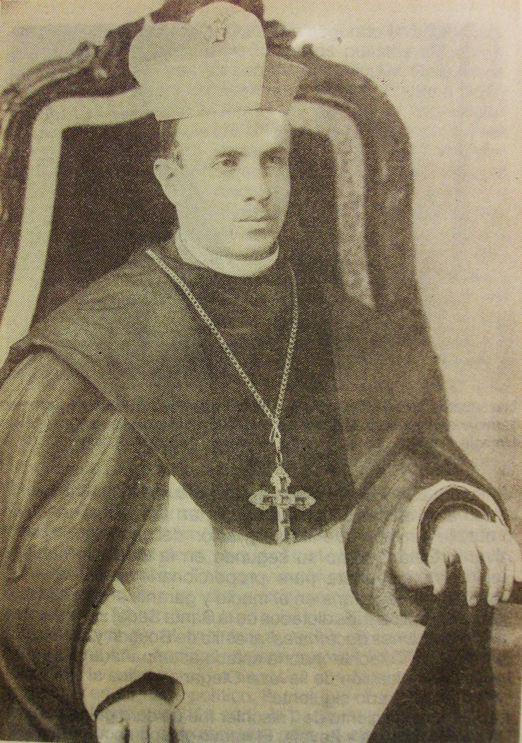 El obispo de Yucatan Martín Tritschler y Córdova en 1900 el día de su consagración